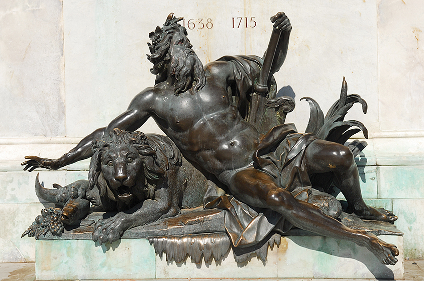 Allégorie du Rhône